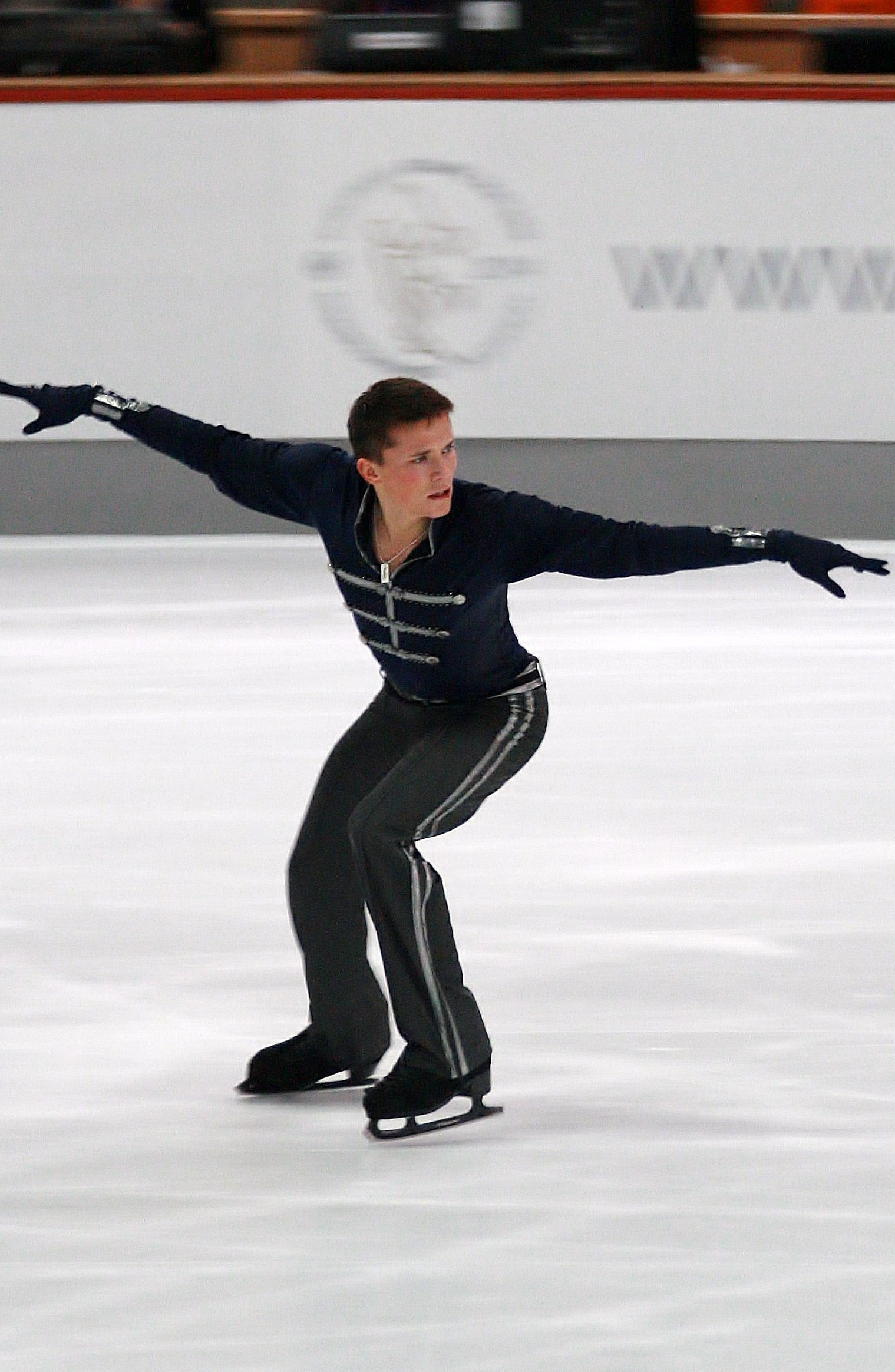 Ондрей Шпигль (Швеция) на 2013 Nebelhorn Trophy